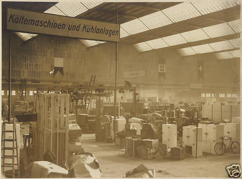 Messeaufbau in Leipzig. Verso Stempel Paul Faulstich, Atelier Helionovum, Leipzig. Format: 22,5 x 16,5 cm